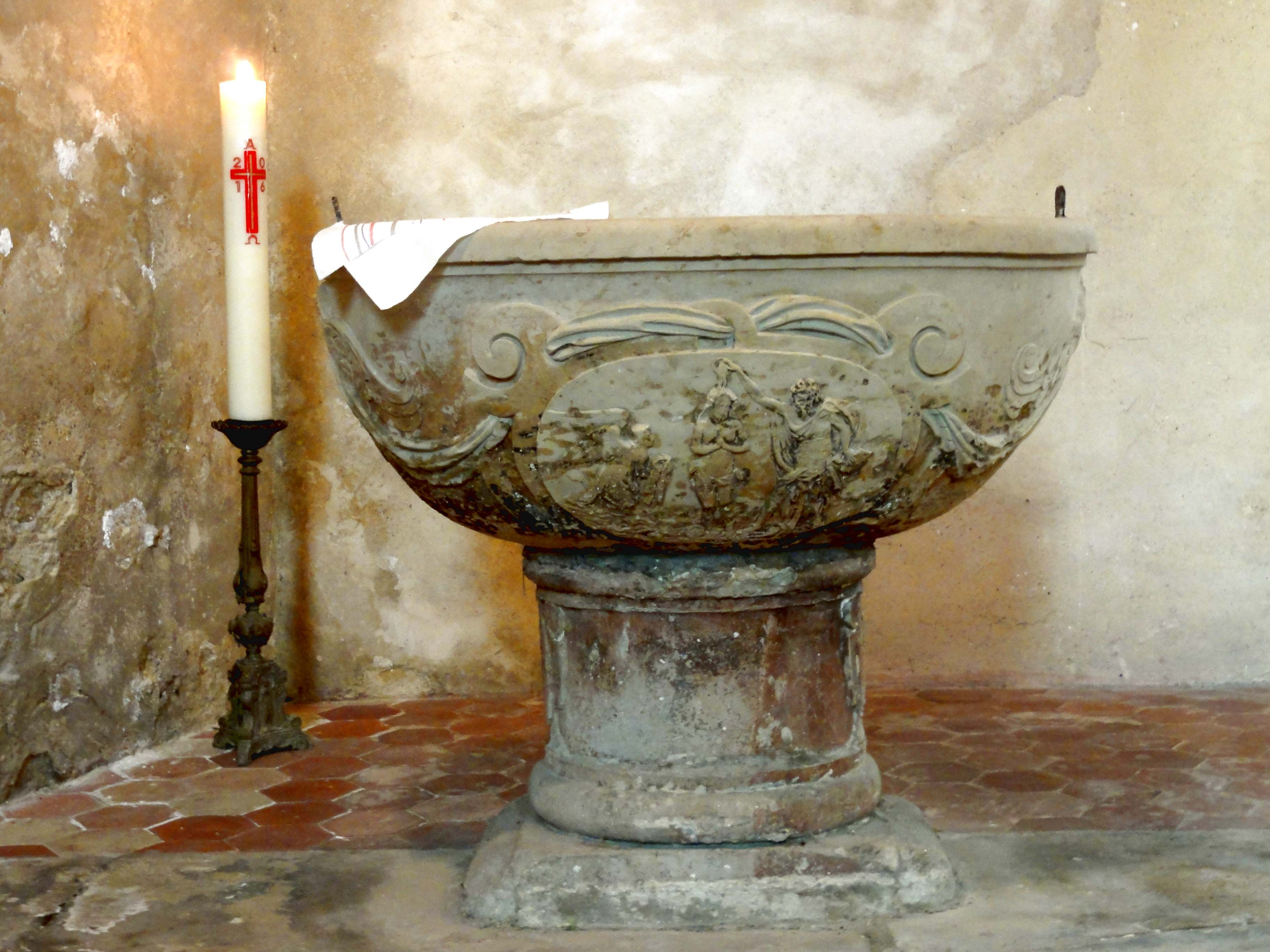 Mobilier de l'église - voir titre.